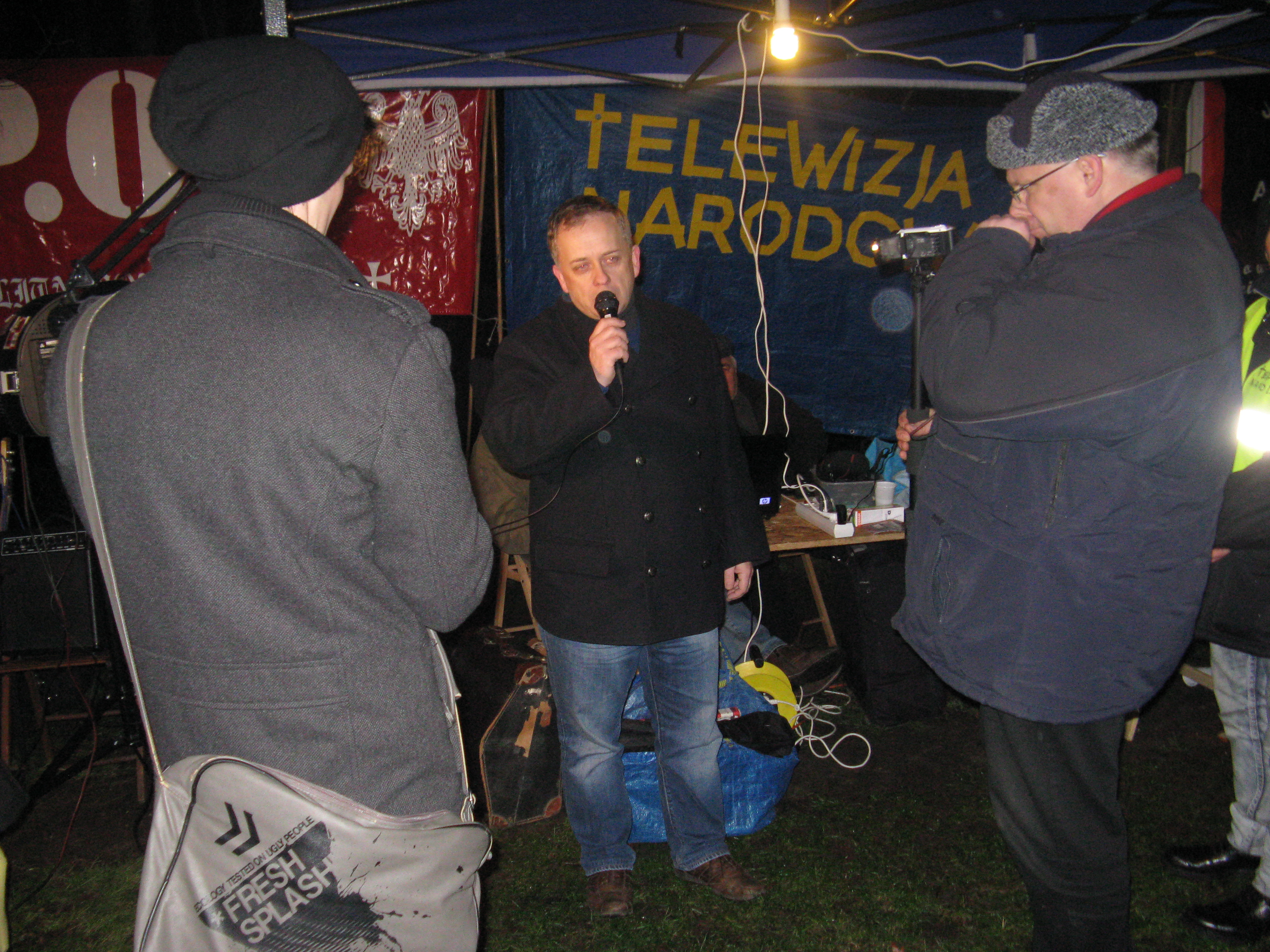 Wojciech Podjacki